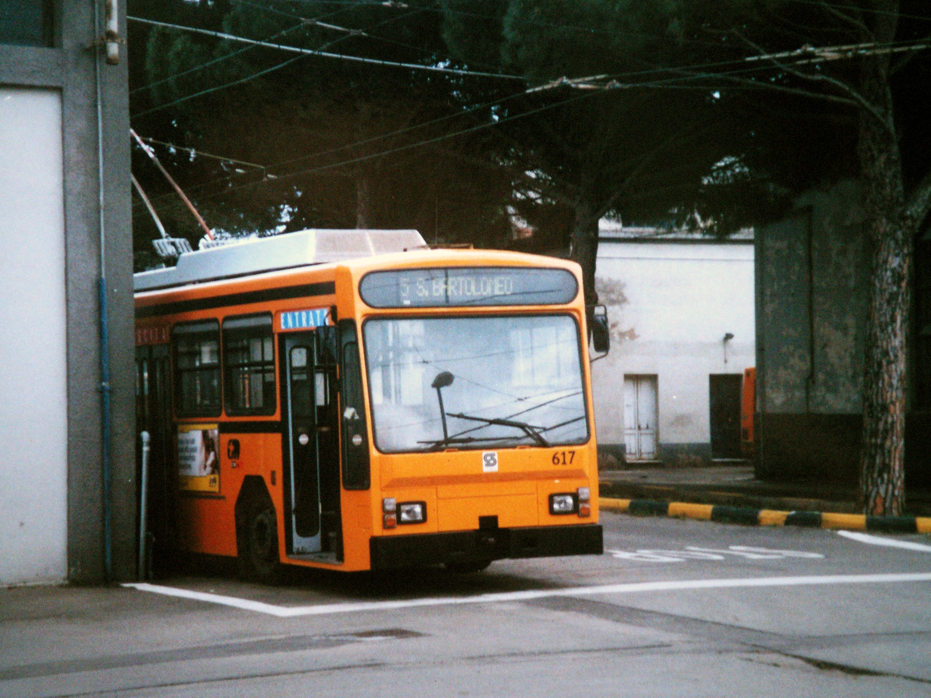 filobus F8839